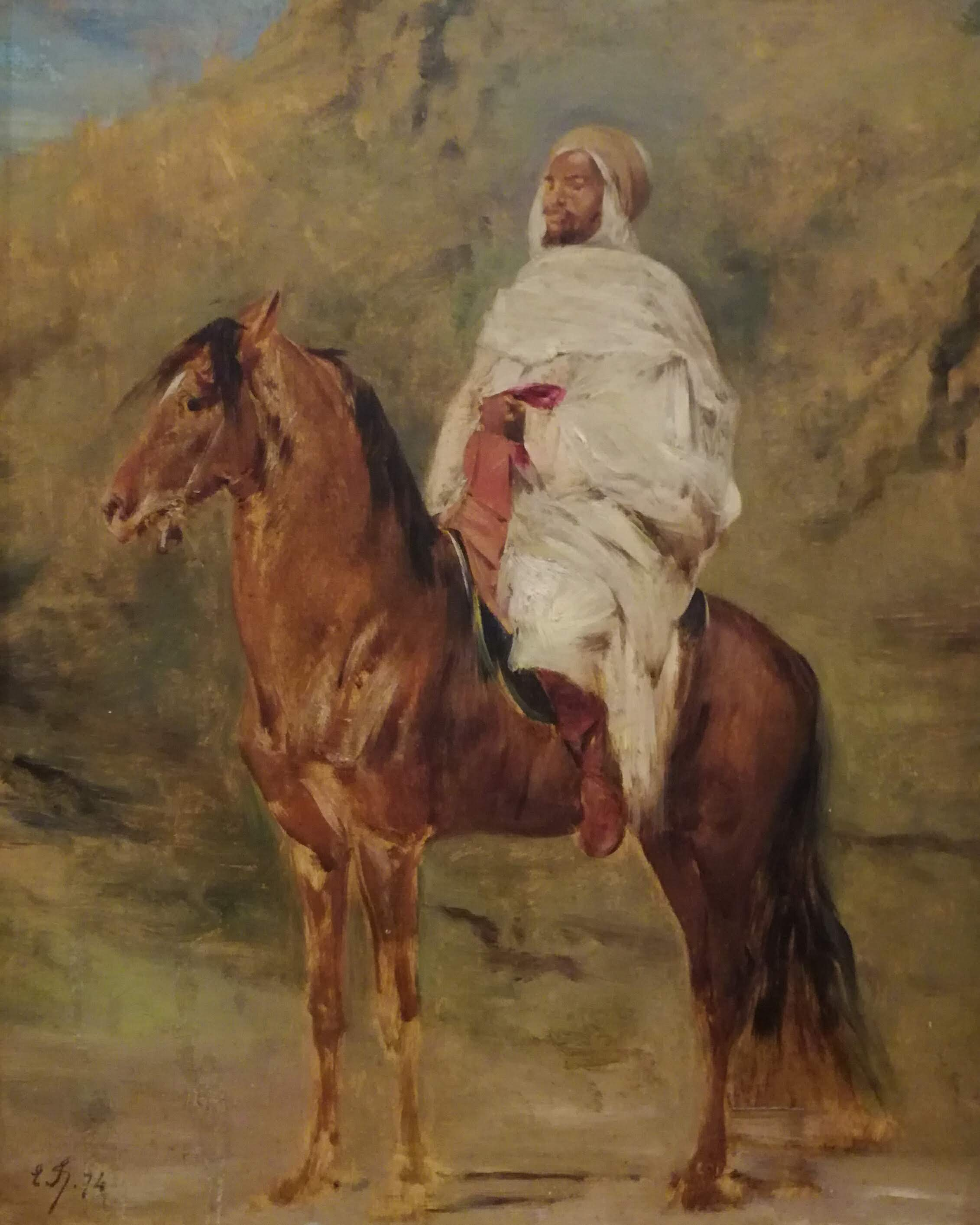 Tableau d'Eugène Fromentin intitulé "Cavalier" exposé au Musée des beaux-arts d'Alger This is an image with the theme "Africa on the Move or Transport" from: Algeria